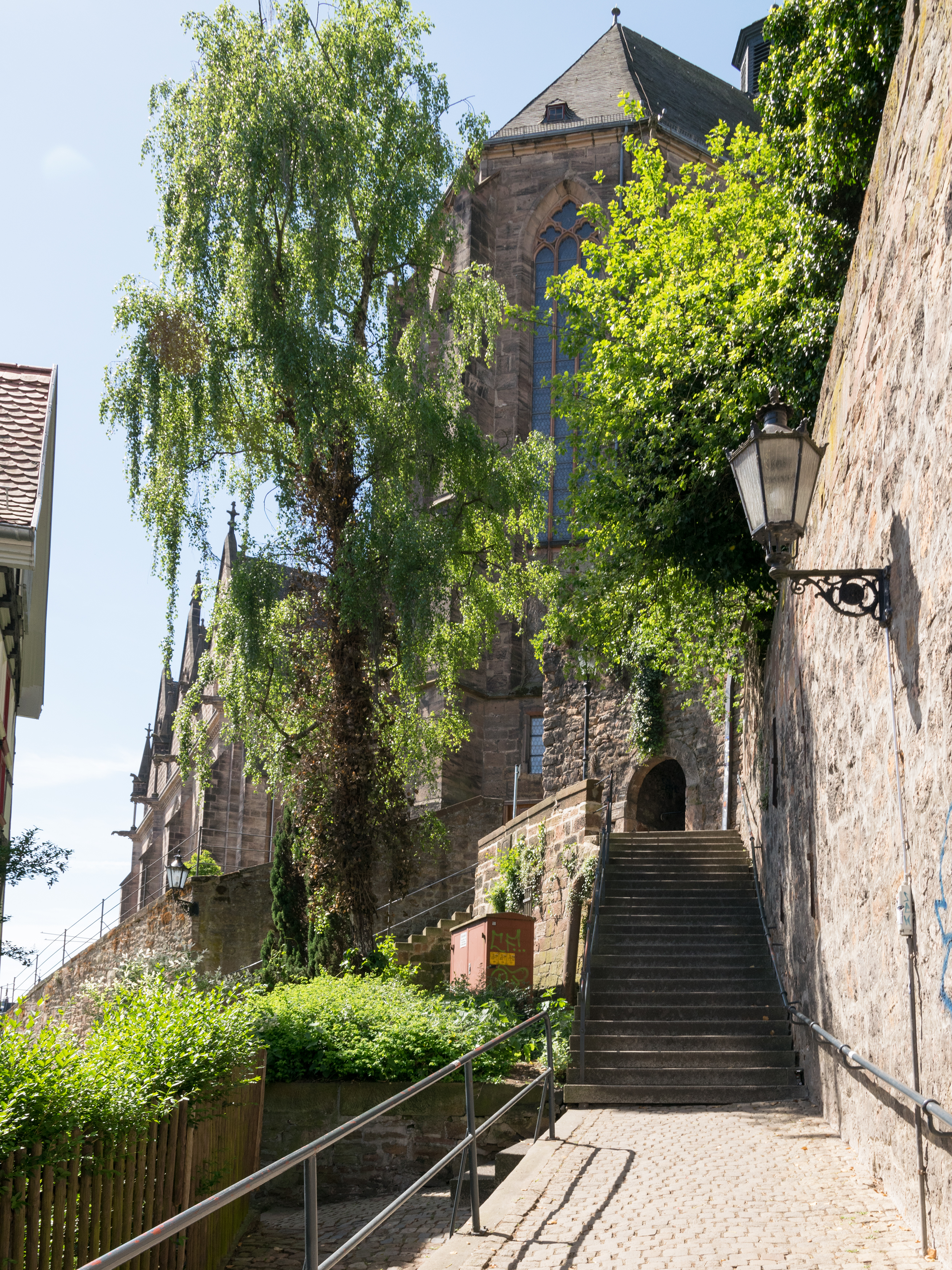 Treppe zur Universitätskirche Marburg